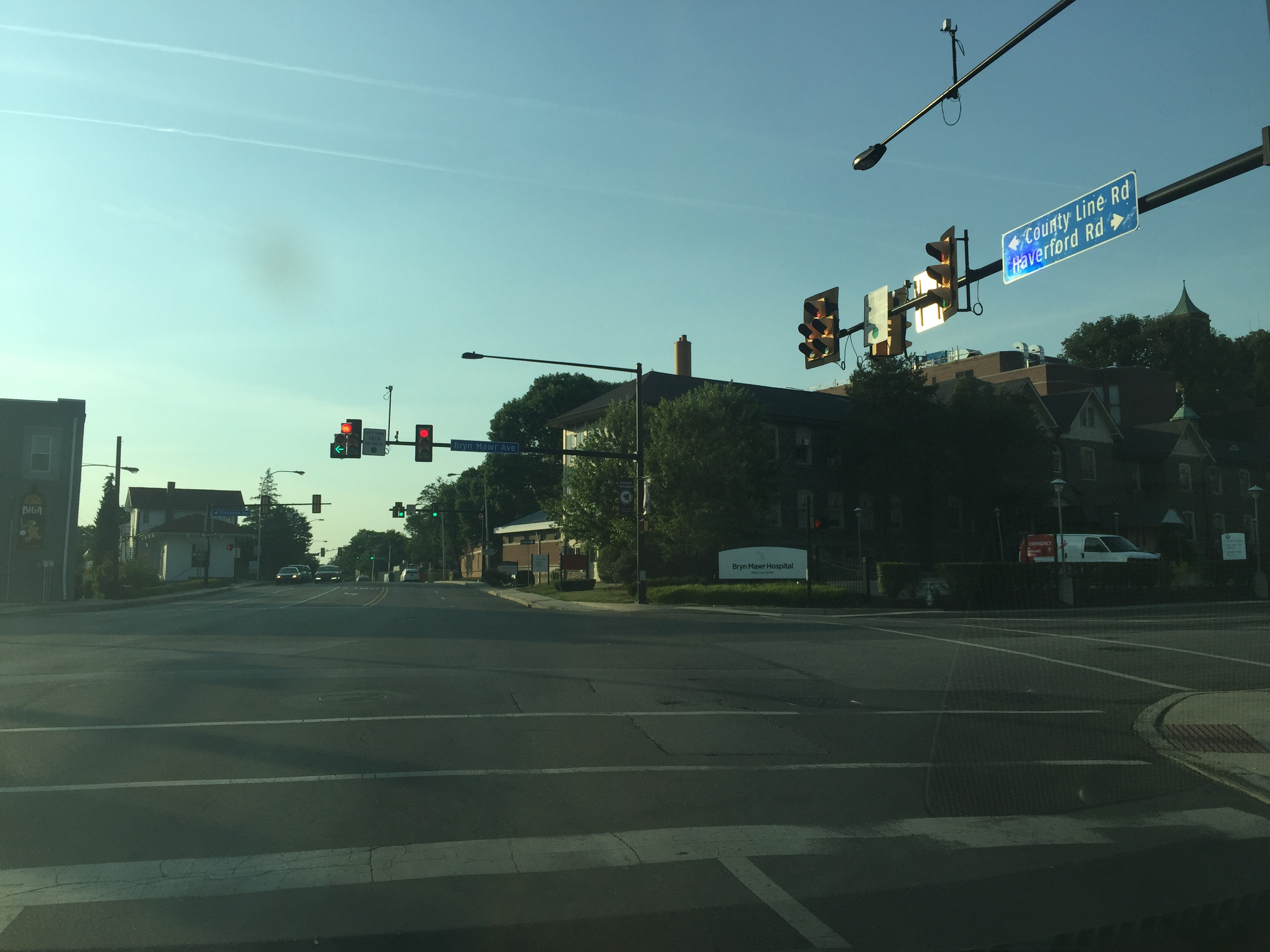 Bryn Mawr hospital